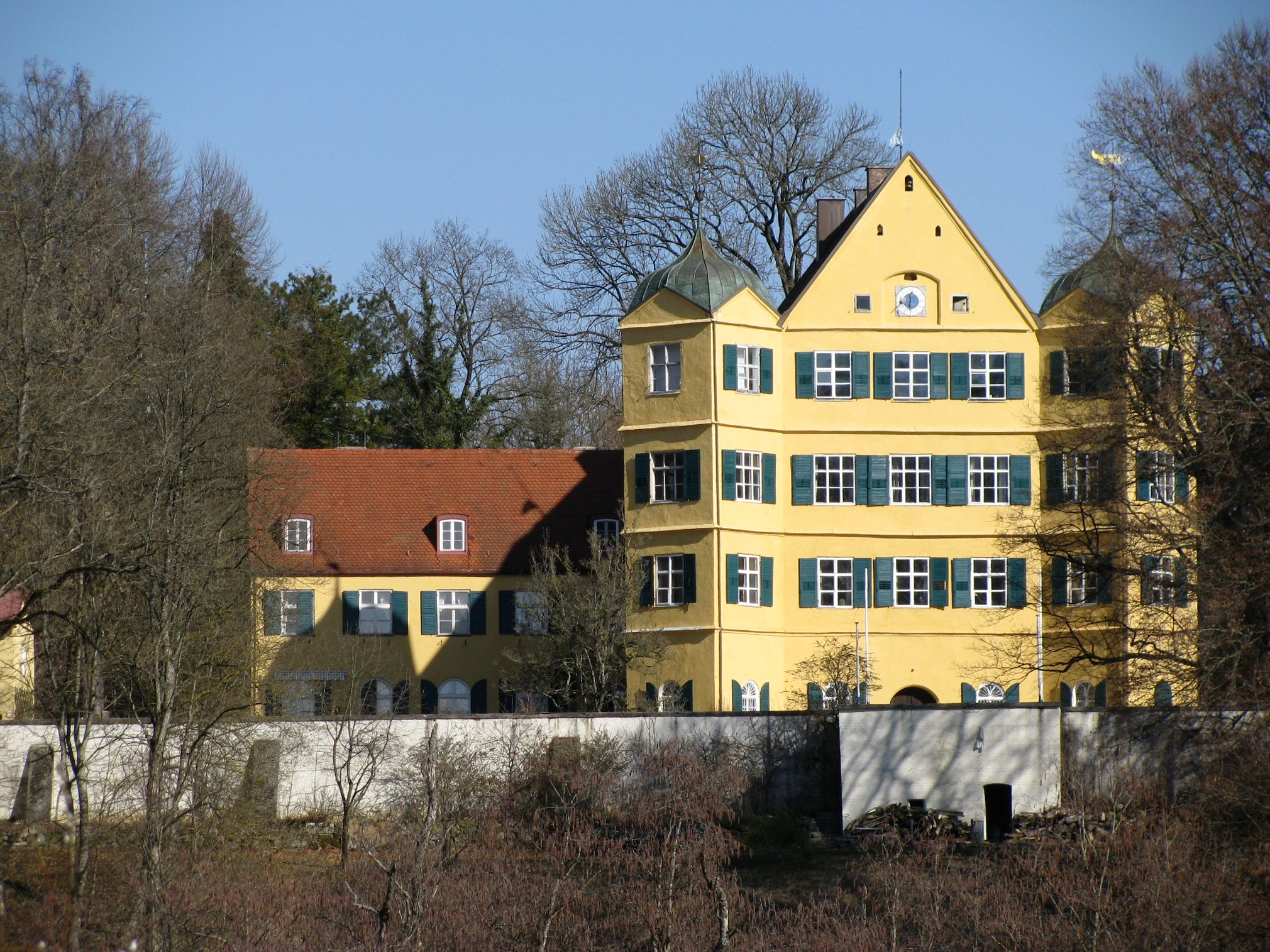 Schloss Leutstetten von Süden